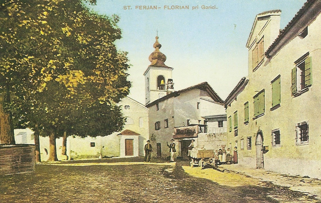 Razglednica Števerjana.